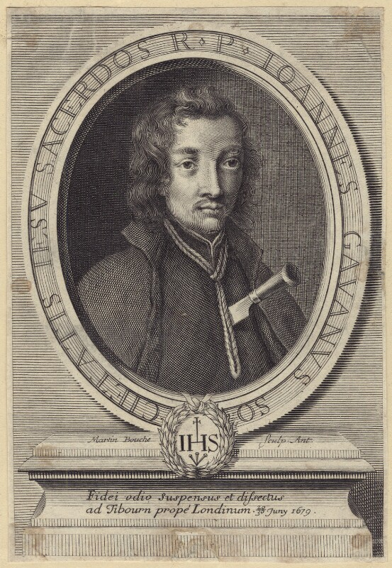 John Gavan (1640-1679))